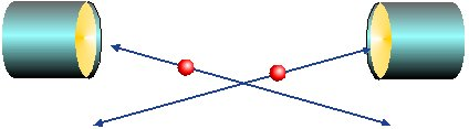 Random coincidence event during PET acquisition